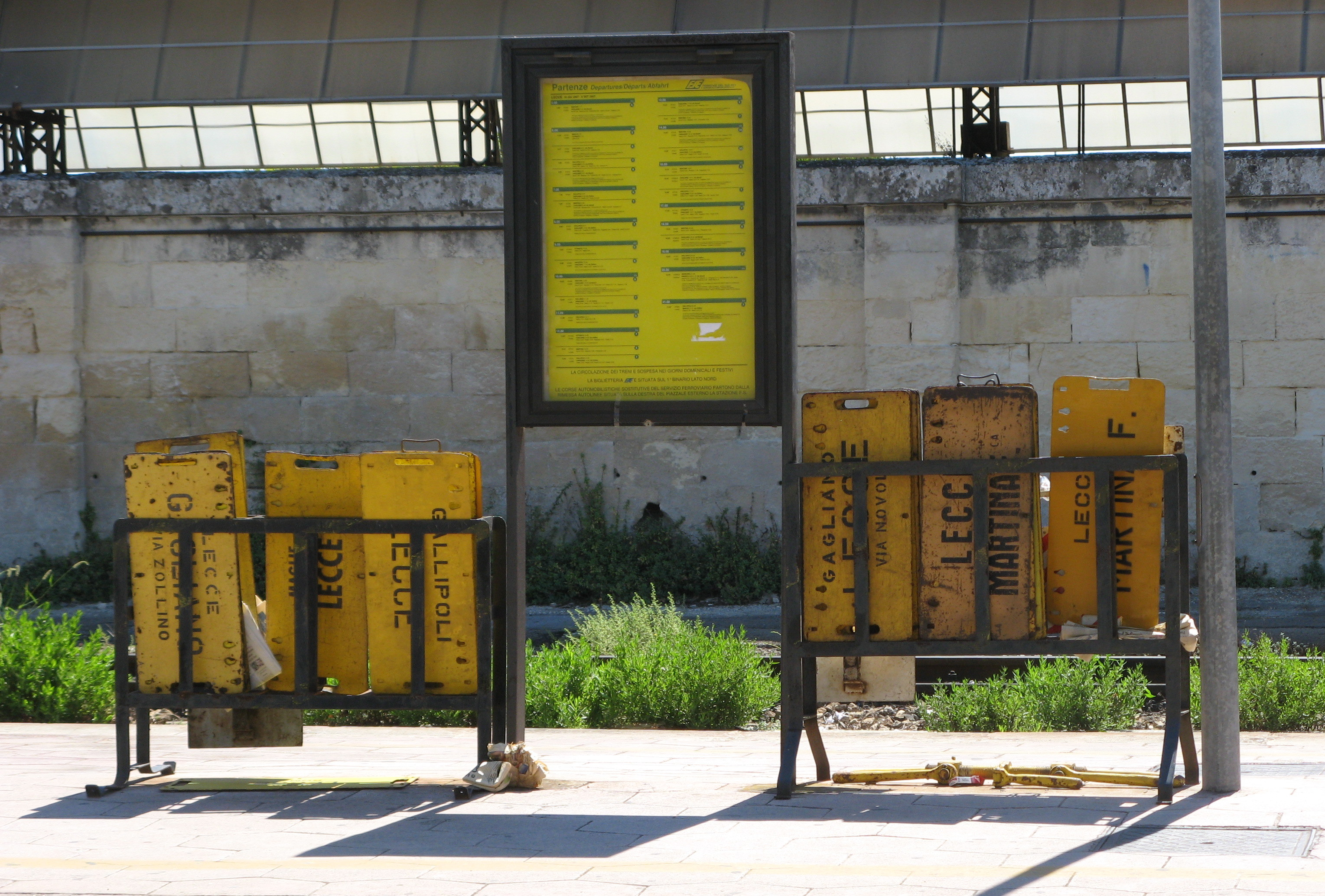 Cartelli delle ferrovie del sud est nella stazione di Lecce